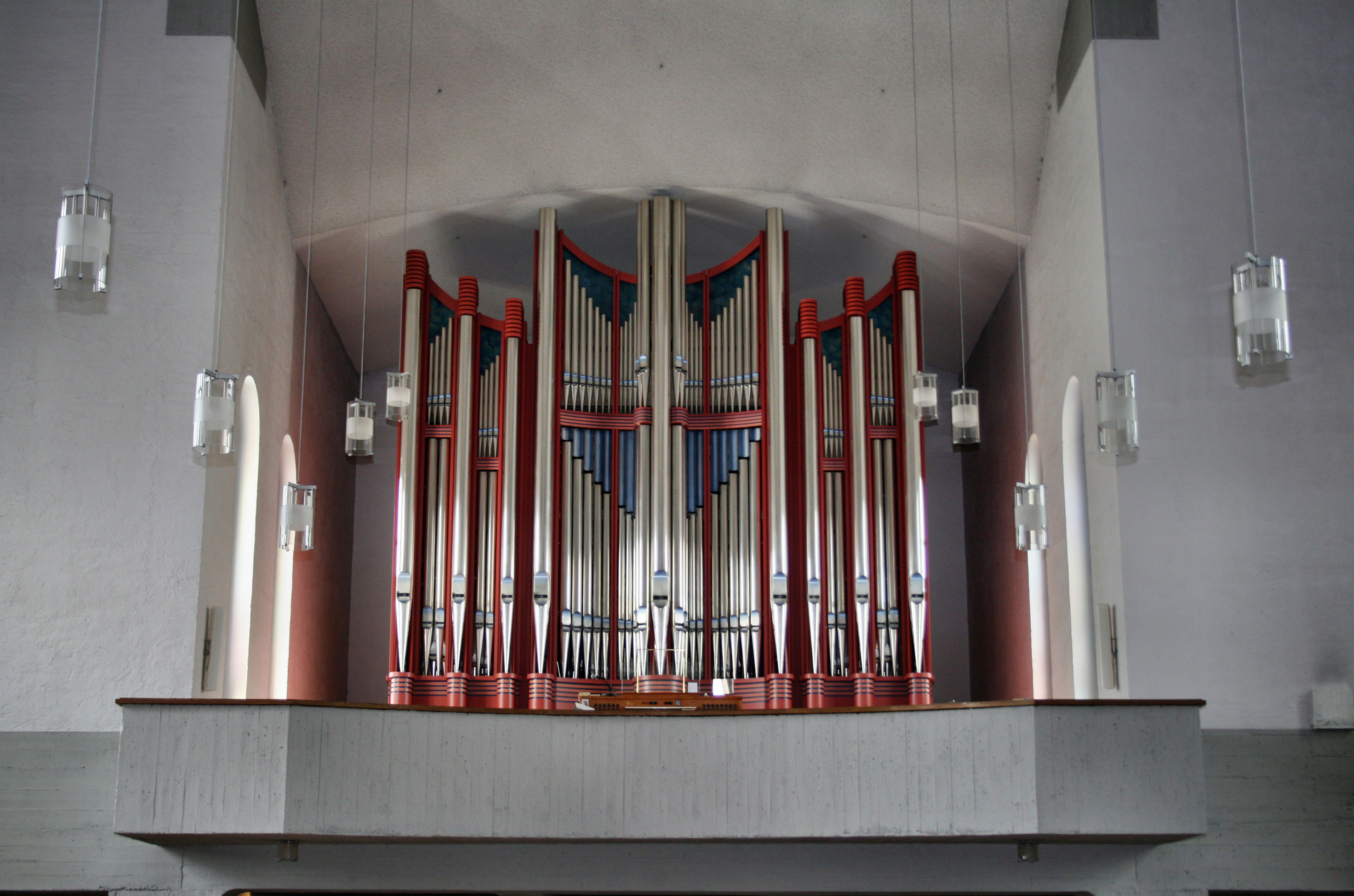 Die Orgel von Mariä Himmelfahrt